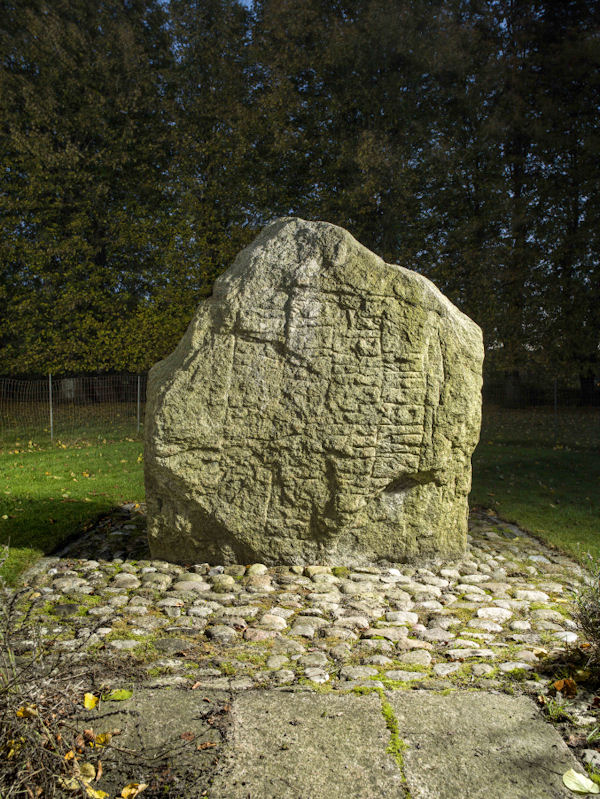 Foto: Nationalmuseet ved Roberto Fortuna